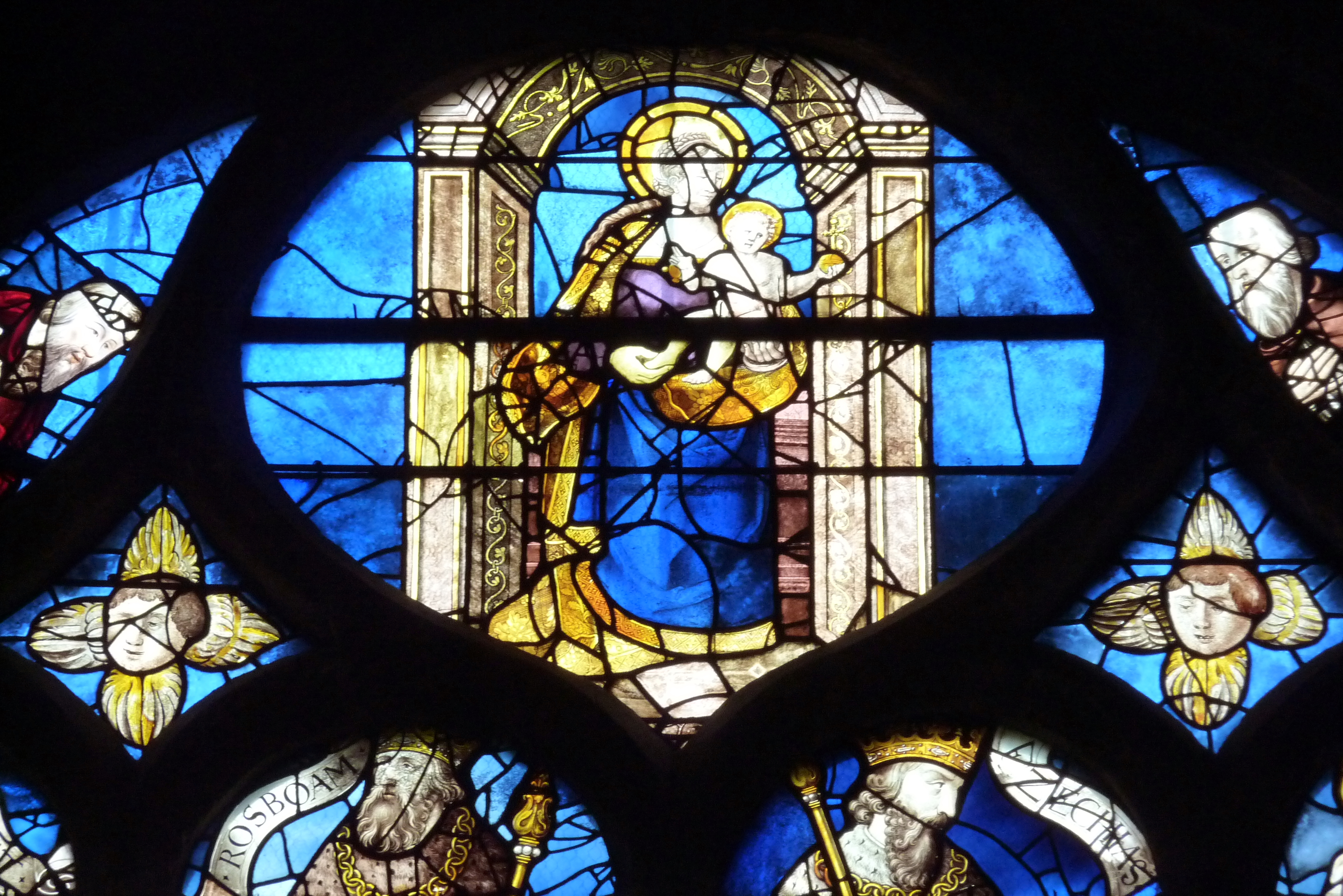 Bleiglasfenster in der katholischen Pfarrkirche Saint-Martin in Groslay, Darstellung: Wurzel Jesse mit Ausschnitt: Madonna mit Kind